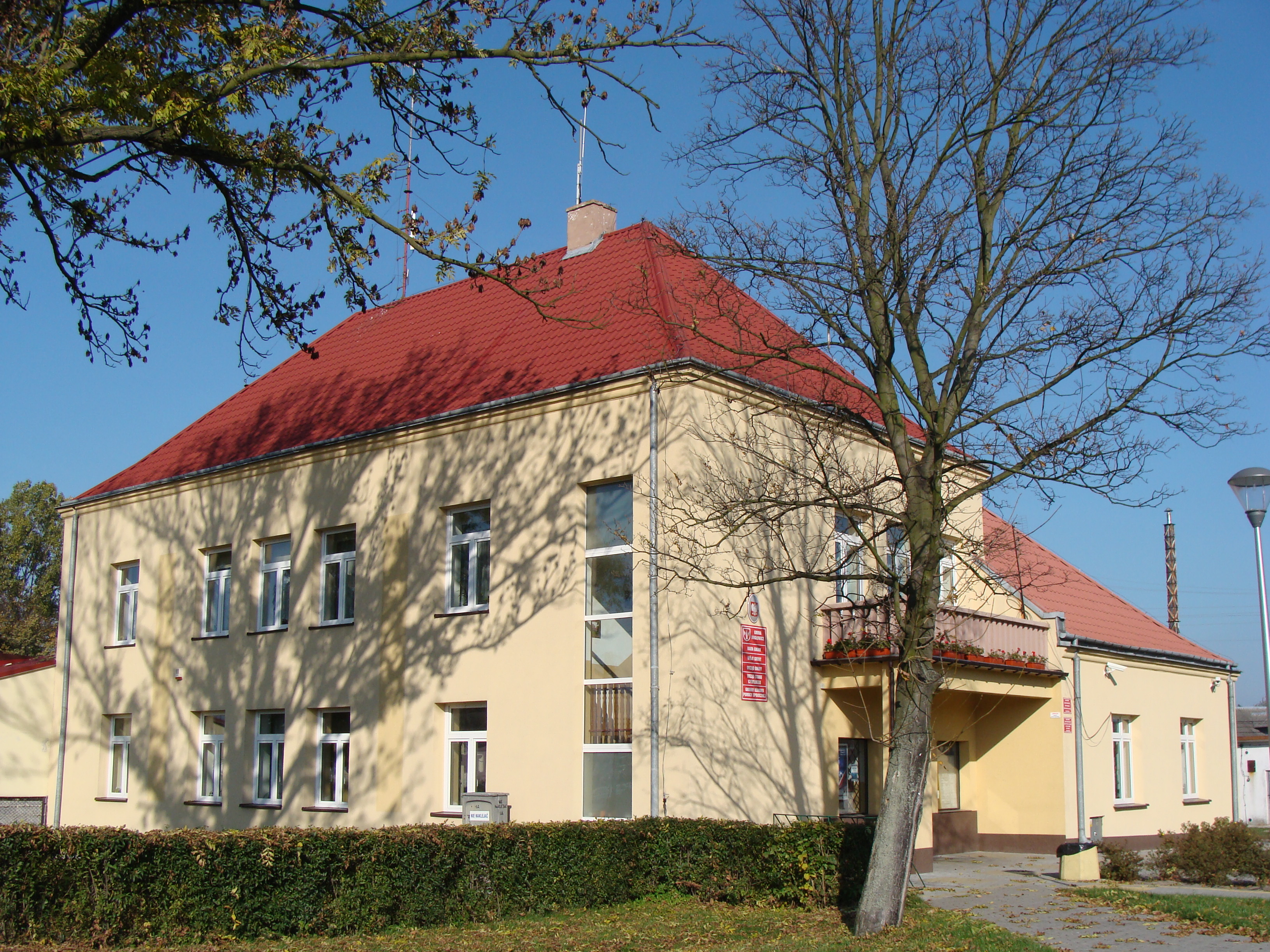 Urząd Gminy w Nagłowicach